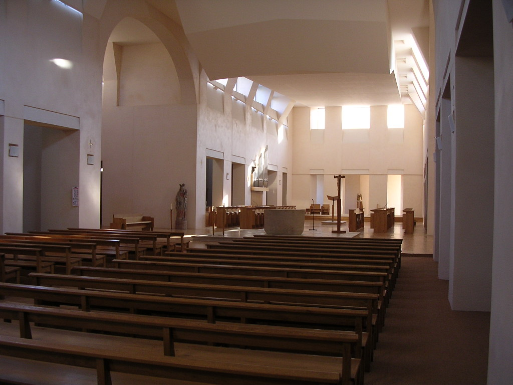 France - Bourgogne - Abbaye de Cîteaux - Intérieur de l'église inaugurée le 21 mars 1998. Architecte Denis Ouaillarbourou